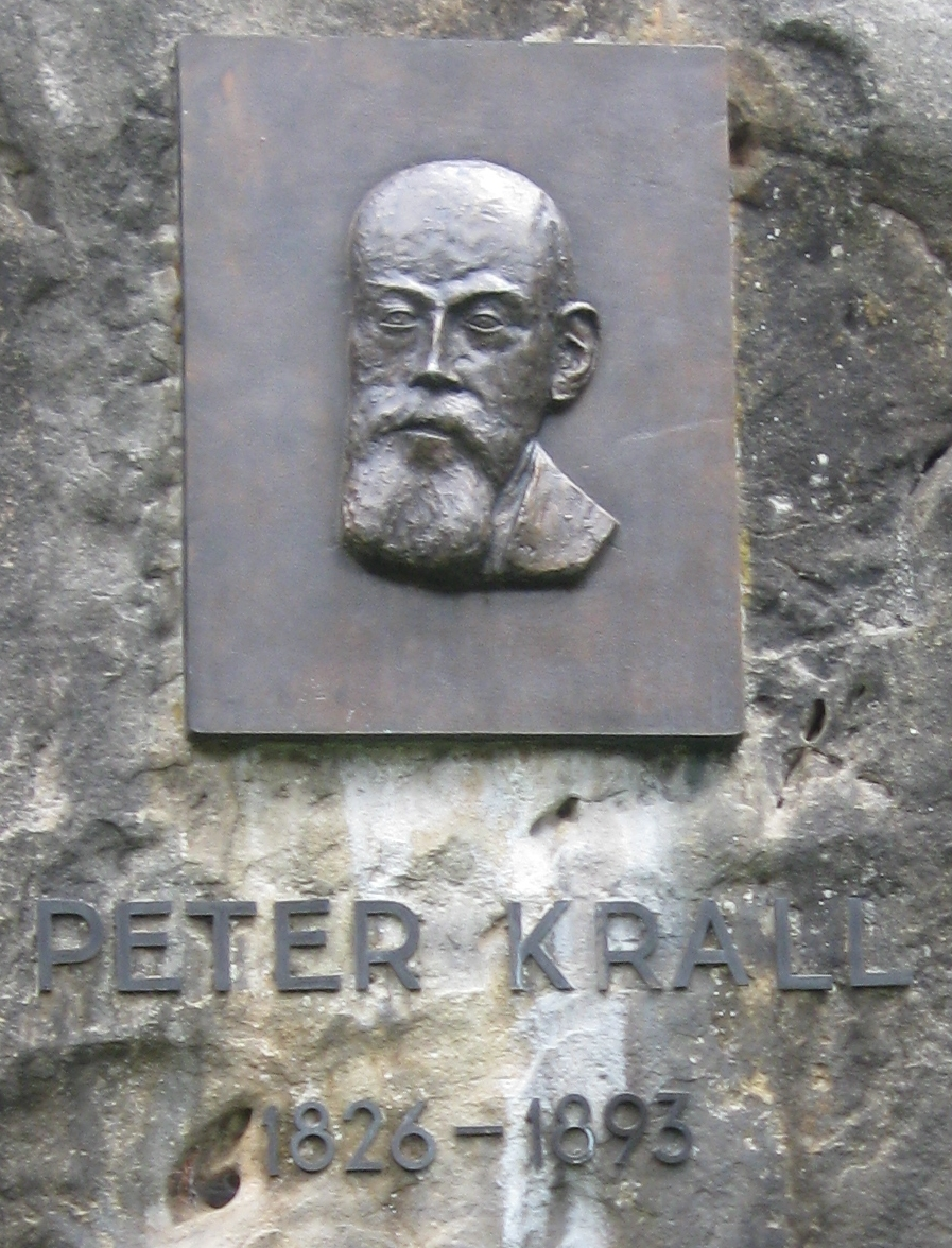 Gedenktstein für Peter Krall im Volkspark in Mönchengladbach